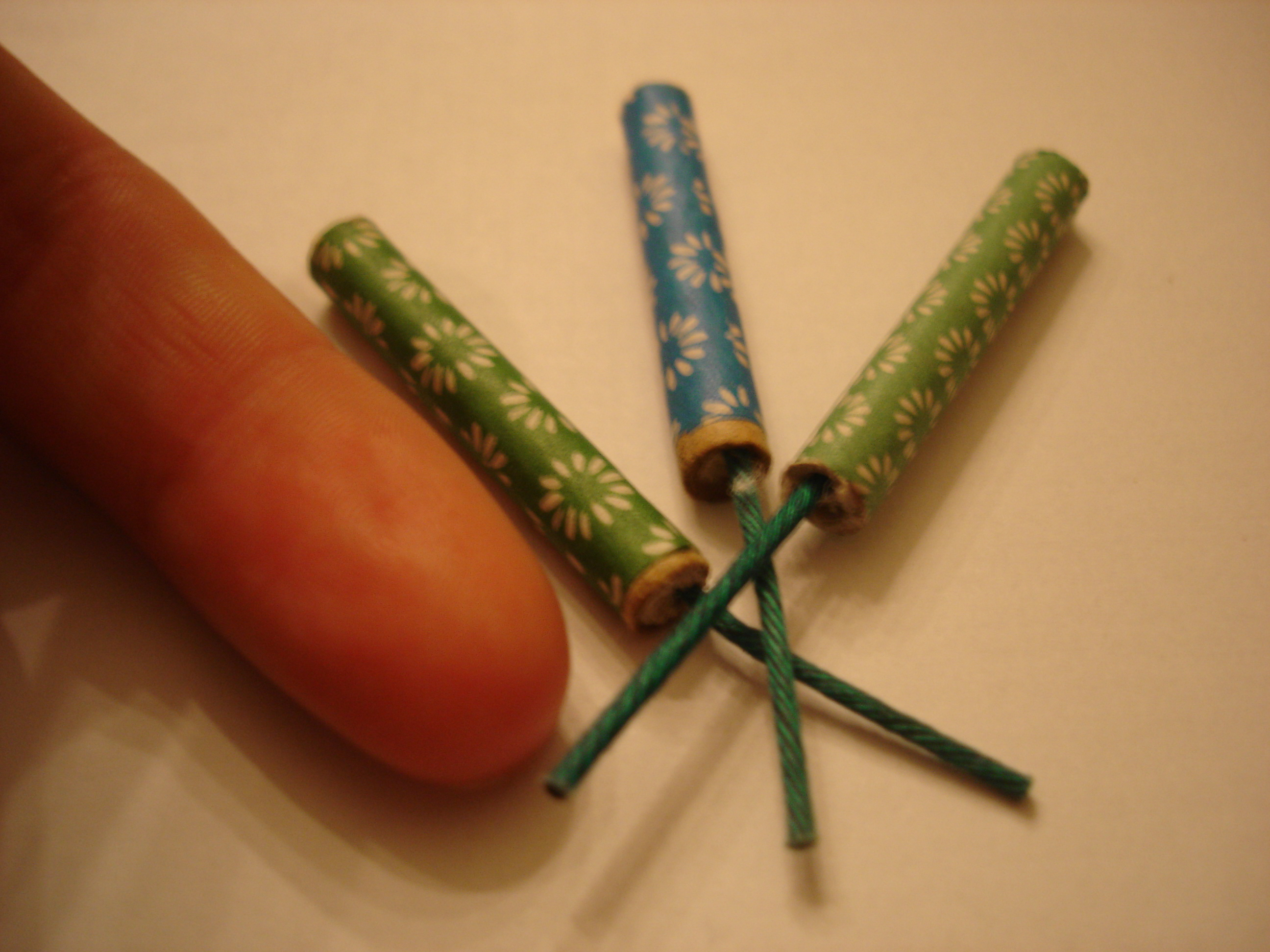 Tres chinos comparados con un dedo humano.